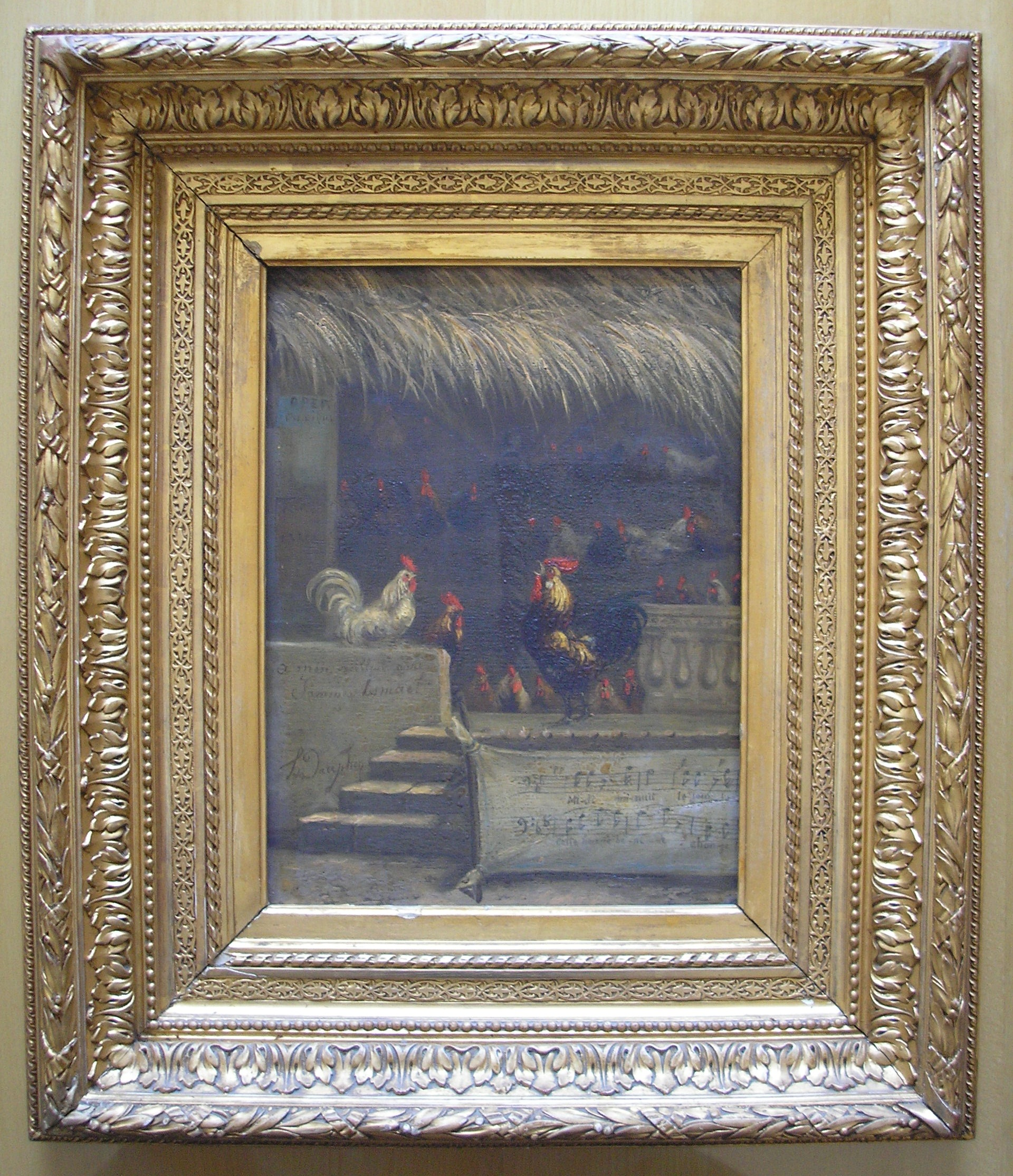 Tableau satirique dédicacé à Jean-Vital Jammes représentant l'Opéra Comique de Paris sous forme de poulailler (vers 1871-1876)